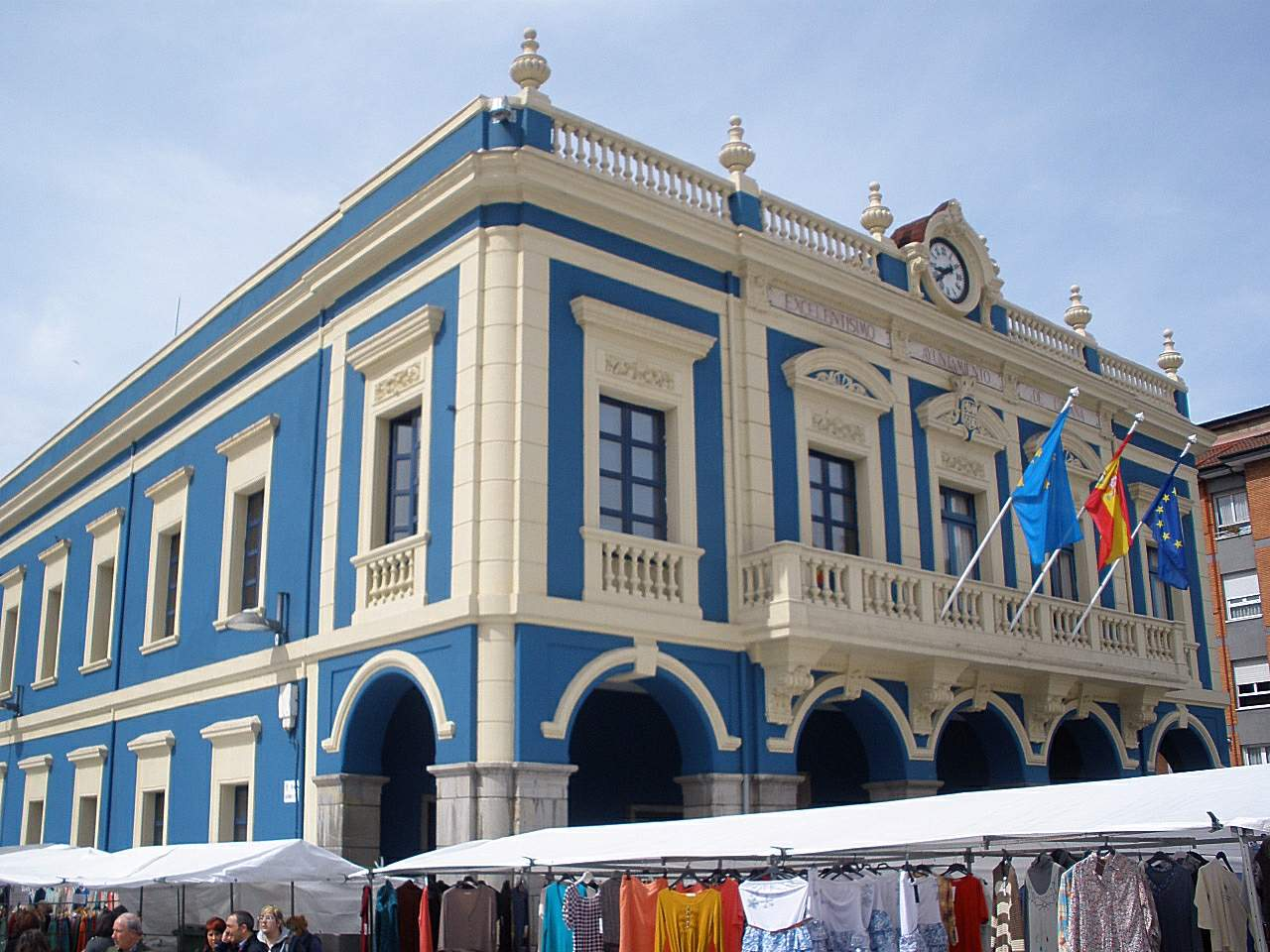 Ayuntamiento de Laviana, en Pola de Laviana (Asturias)